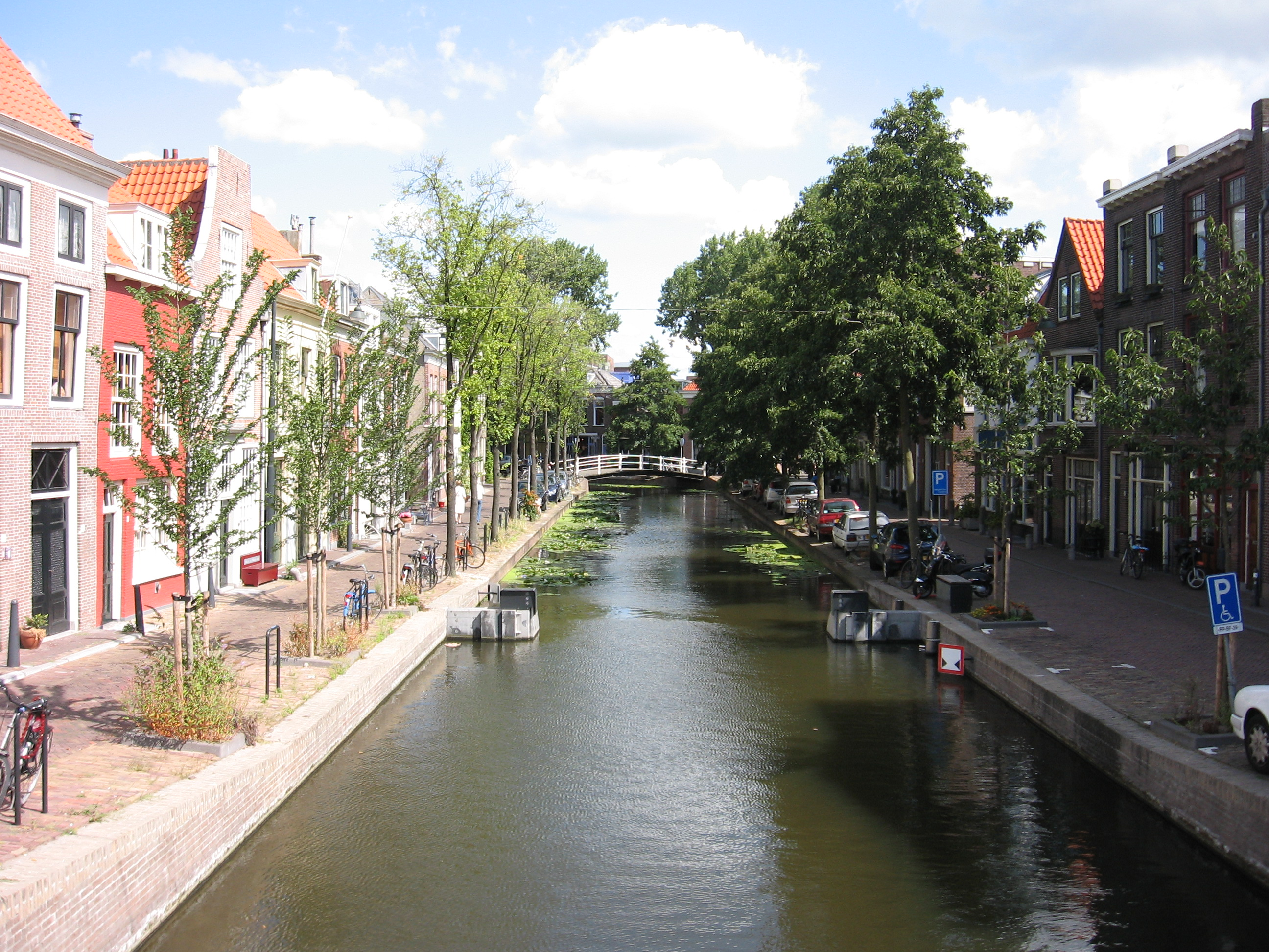 Delft - Achterom.jpg. In the background: Rozemarijnbrug.